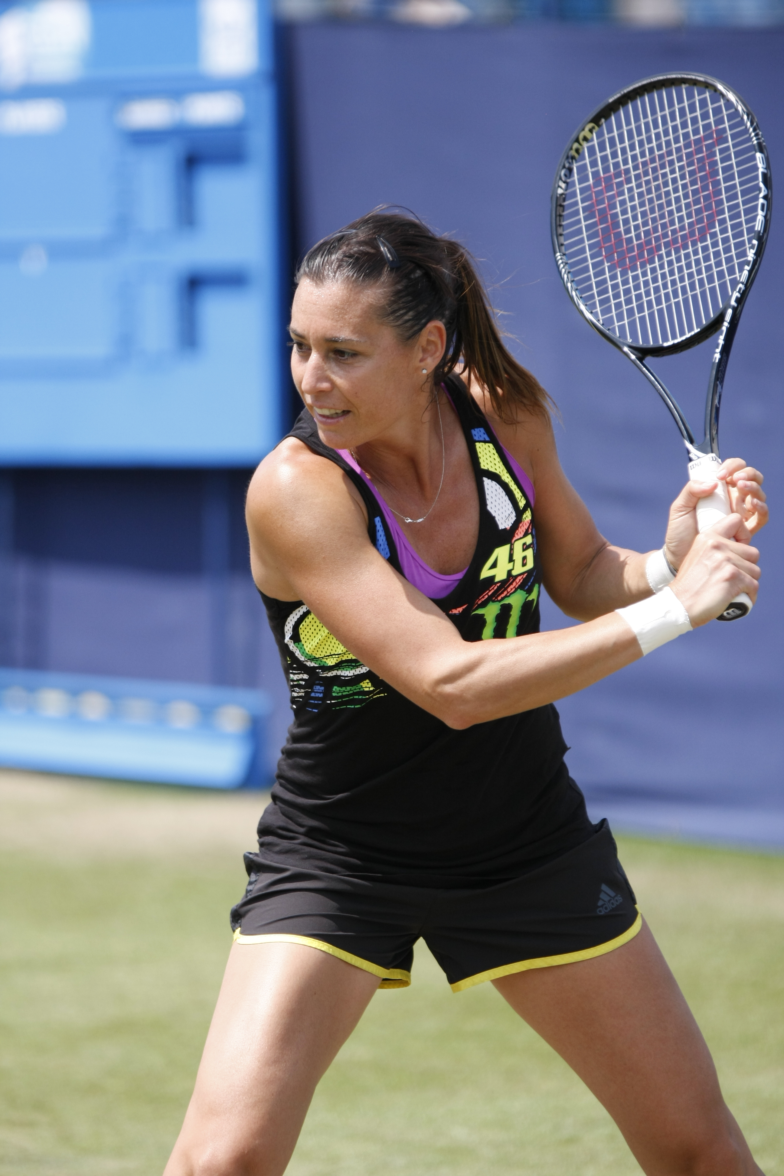 _MG_1377